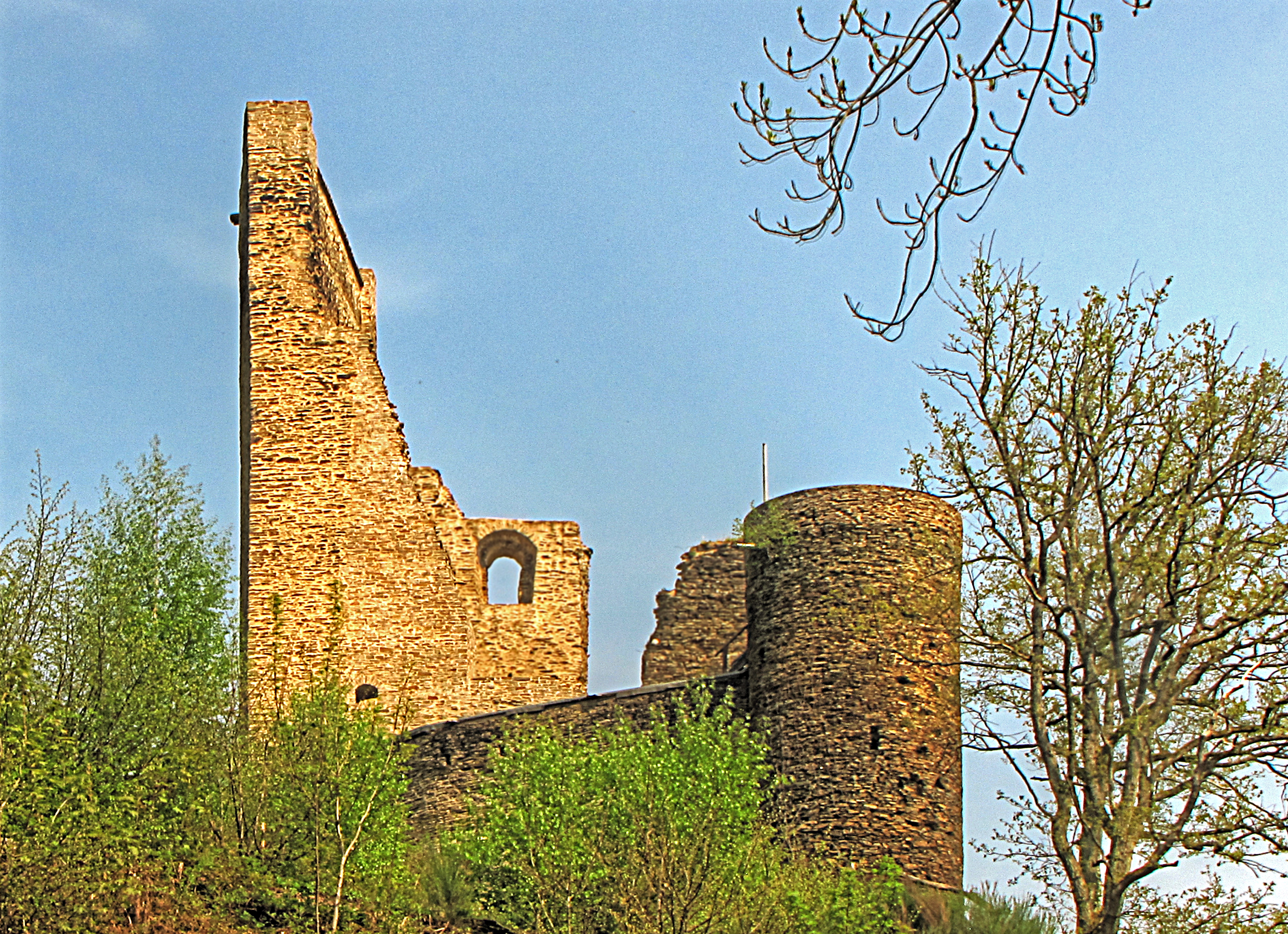 Burgruine Raubritterburg Reichenstein